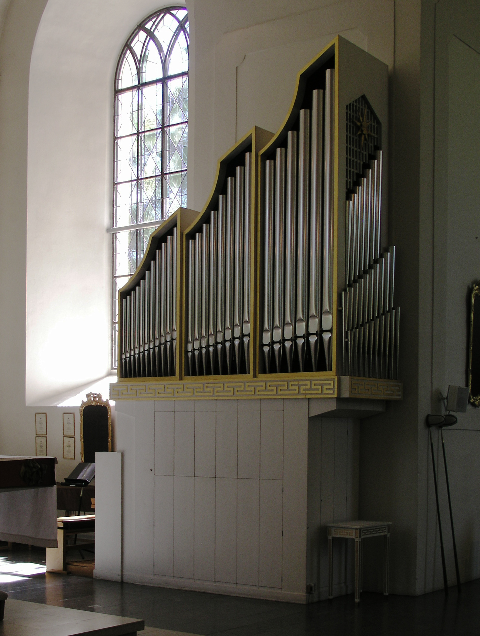 Karlstads domkyrka / Cathedral of Karlstad. Choir organ.